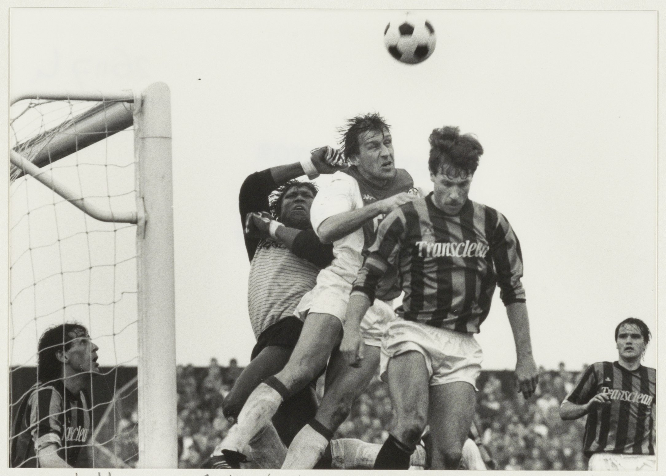 CollectieCollectie Fotoburo de BoerInventarisnummerNL-HlmNHA_54015451NL-HlmNHA_1478_26117KBeschrijvingBekerwedstrijd RCH-Ajax 1-3. Op de foto v.l.n.r.: K.v.Grootveld, Florian Vyent, Ronald Spelbos (Ajax), Ben van leeuwen, R. Hoogervorst.FotonummerNL-HlmNHA_1478_6237DocumenttypeHistorieprenten, tekeningen en foto'sVervaardigerBoer, Poppe de Soort vervaardigerFotograaf AnnotatiesHD200386LandNederland ProvincieNoord-Holland GemeenteHeemstede PlaatsHeemstede StraatSportparklaan Begindatum03-1986Einddatum03-1986TechniekFoto Trefwoordenrecreatie, voetbal